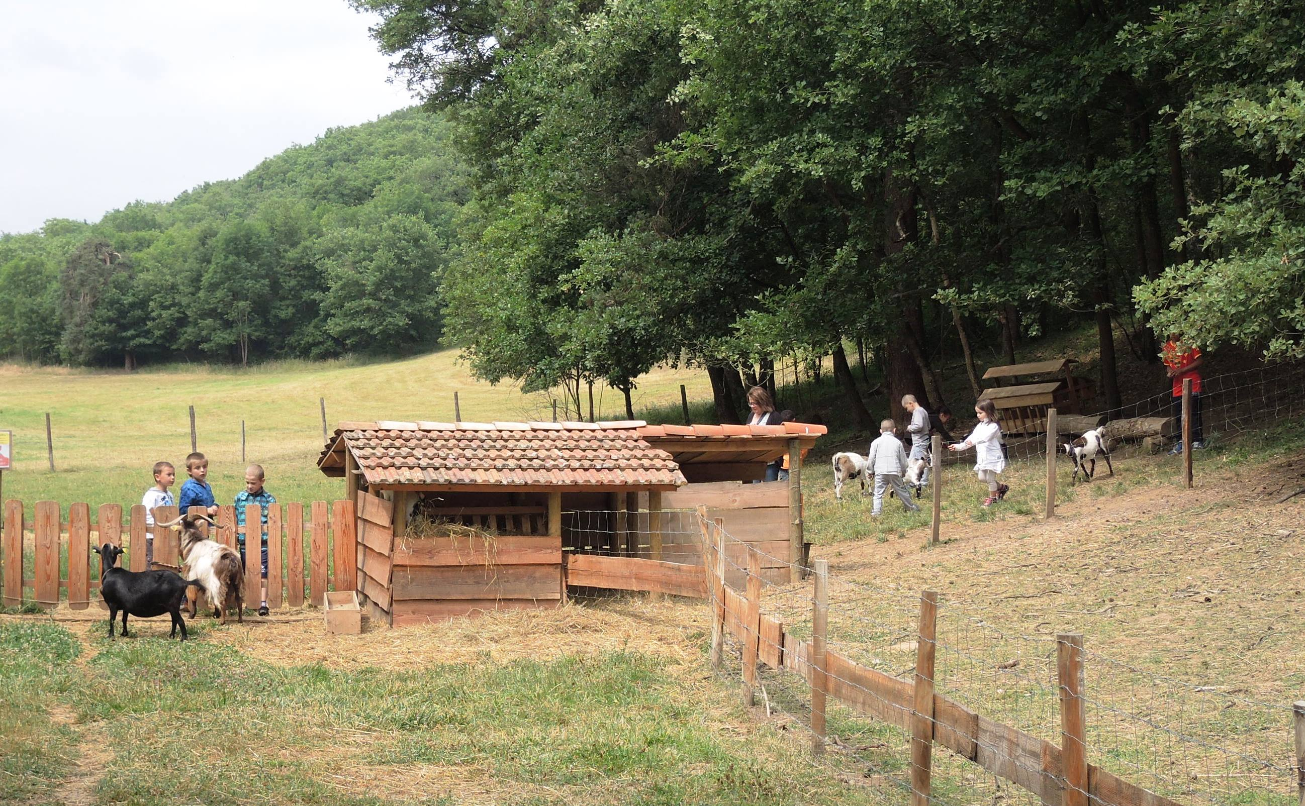 Ardoix chèvres